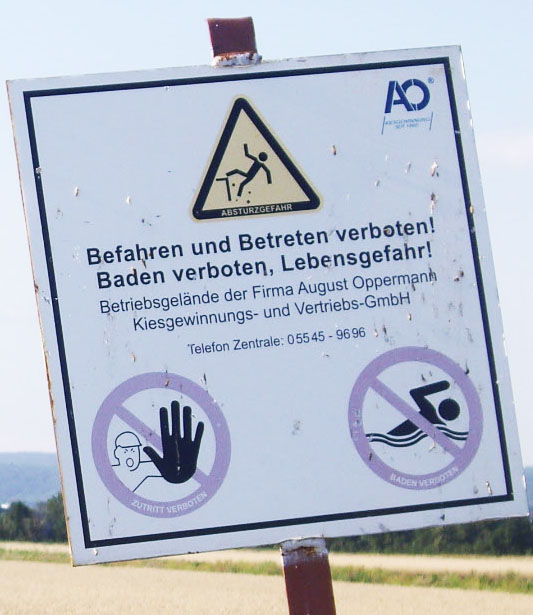 Rosdorfer Baggersee bei Göttingen, Badeverbotsschild im Nordbereich, Blick nach Norden Richtung Göttingen, 23.7.2014. Foto: F. Welter-Schultes.